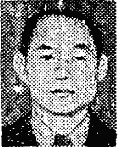 青木均一